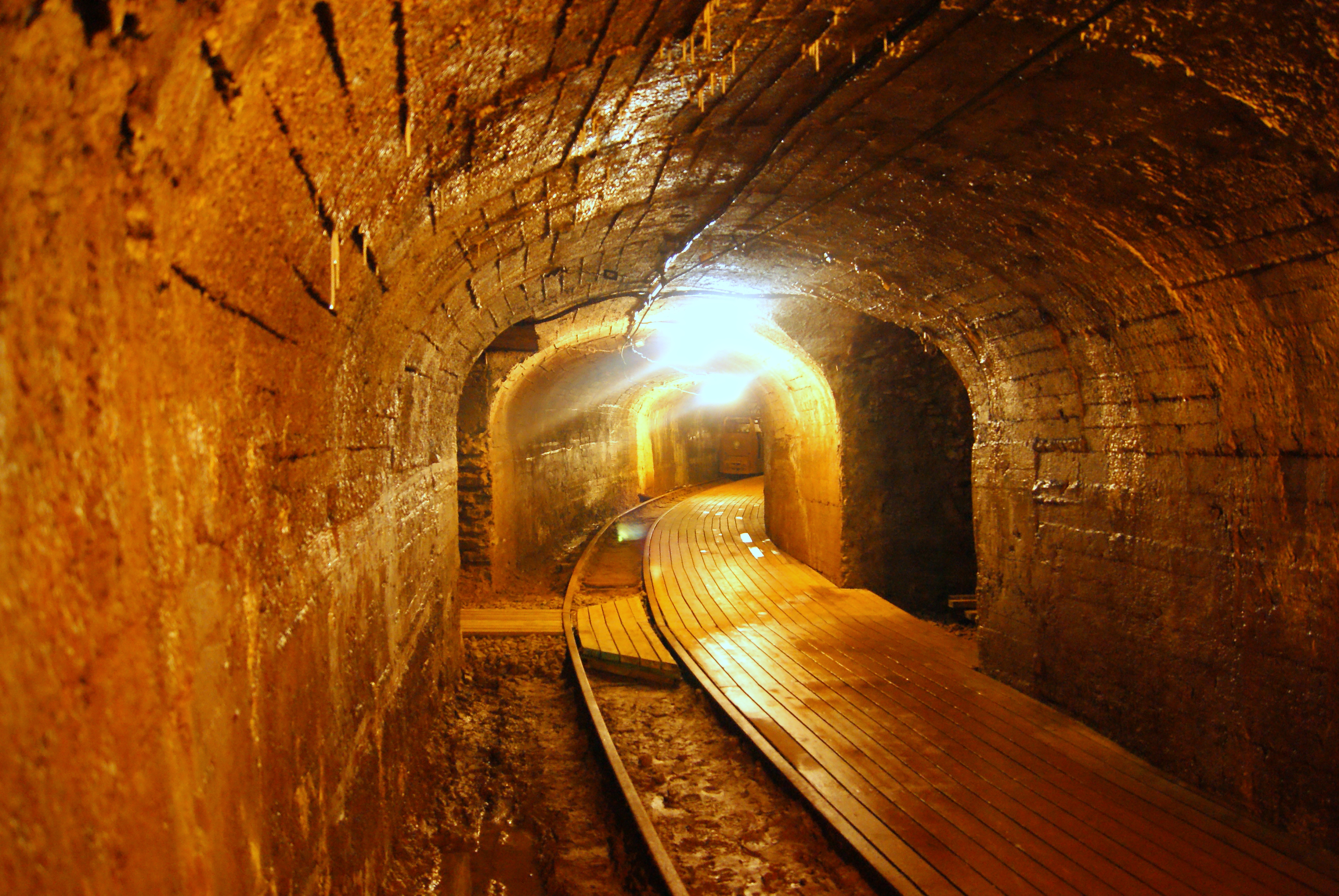 Kohtla-Nõmme, Ida-Viru maakond, Estonia